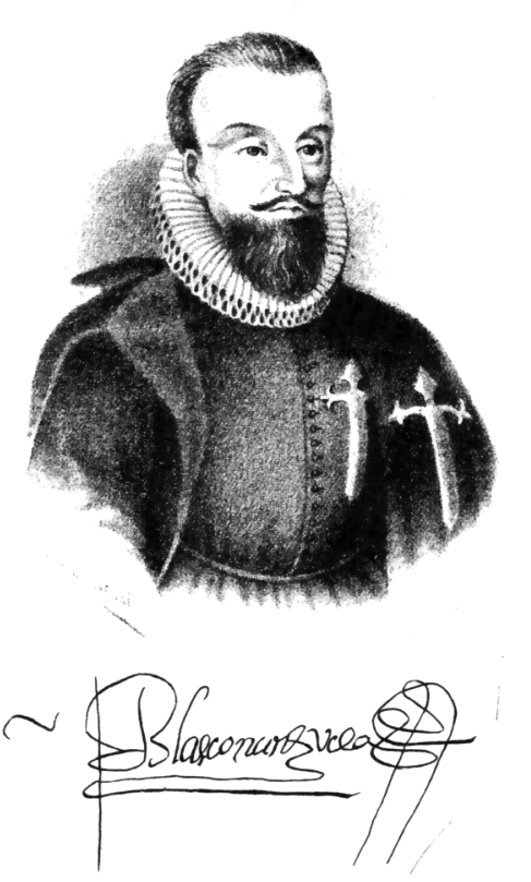 Blasco Núñez Vela, caballero de Ávila y primer virrey del Perú (1544-1546)